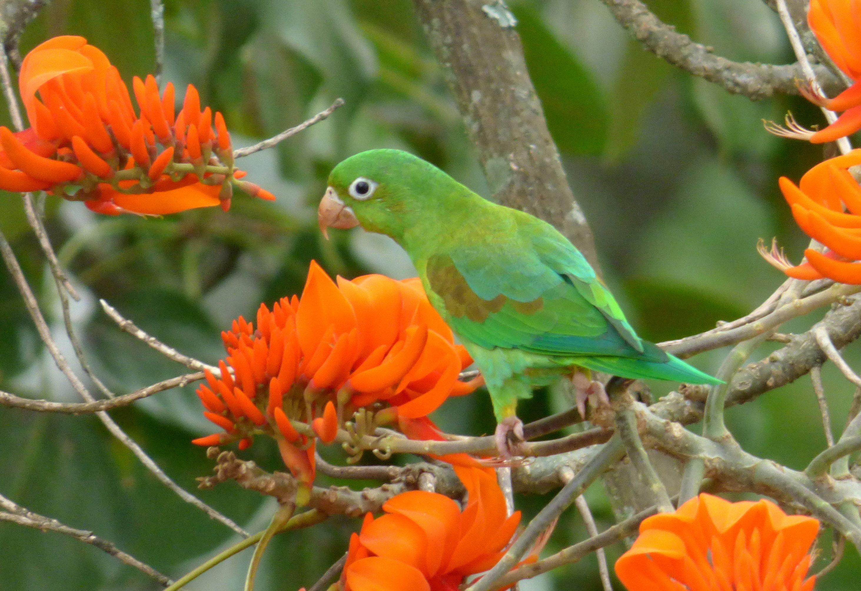 Brotogeris jugularis (Perico broncíneo)